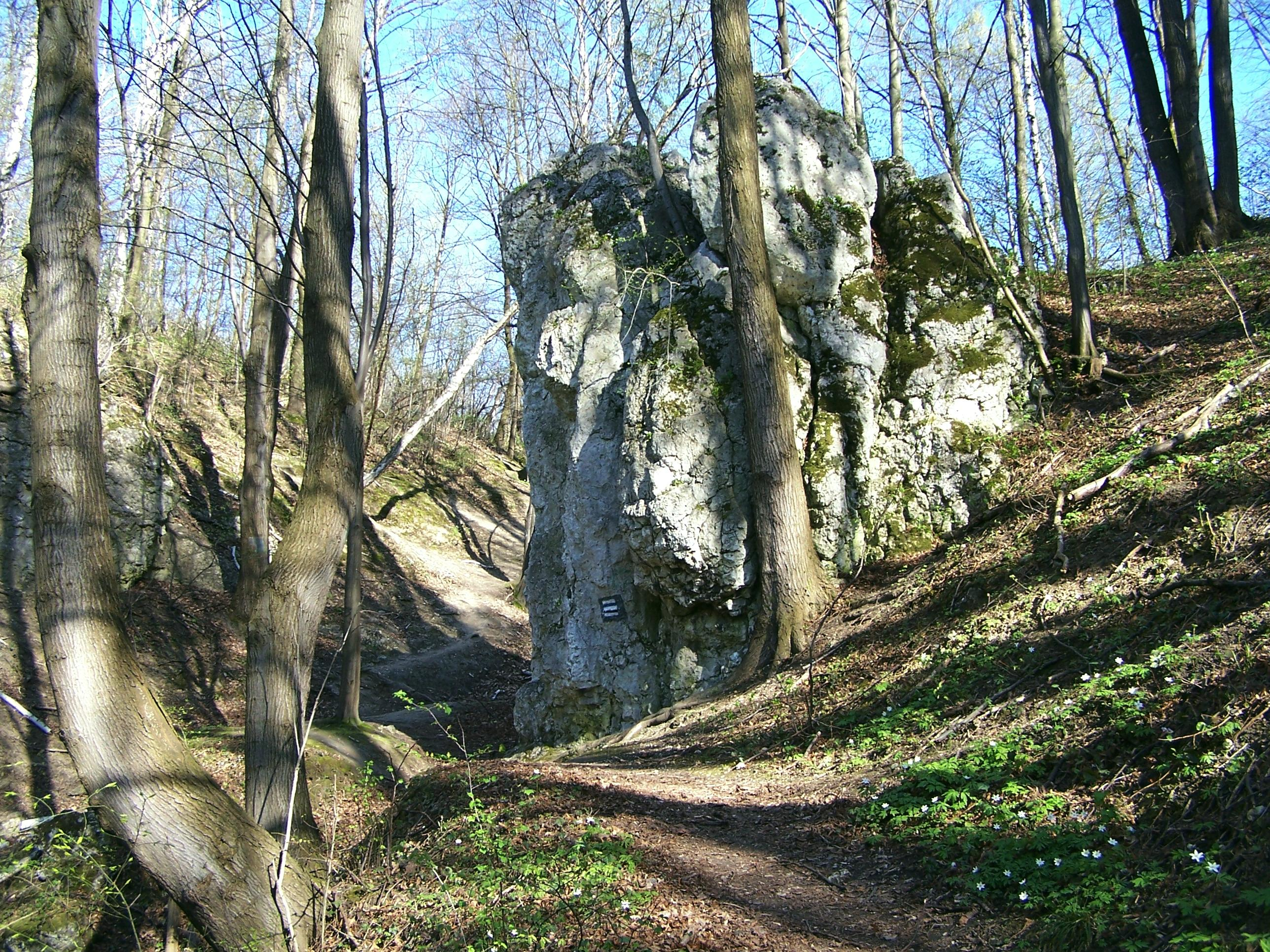 Dolina Kluczwody (Dolinki Krakowskie)